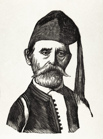 Зисис Сотириу